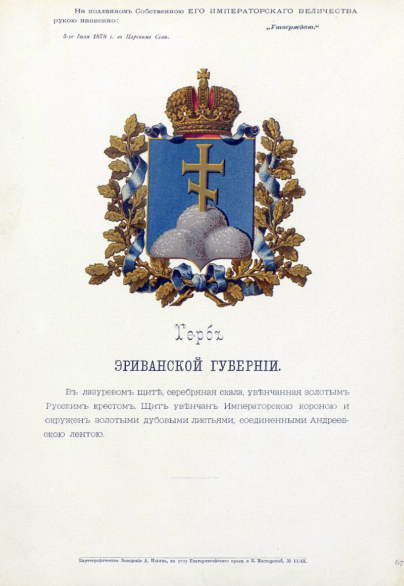 Official Russian Empire coat of arms Erivan Governorate. Герб Российской Империи Эриванской губернии с официальным описанием в Гербовнике Бенке. Утверждён Императором Всероссийским Александром Вторым в 1878 году.